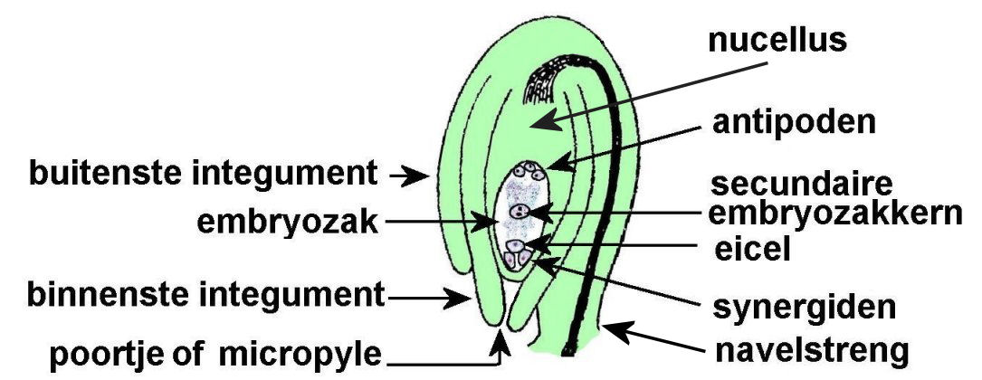 Description Zelfgemaakte tekening van een zaadknop. Onder GFDL geplaatst door de auteur. Zelfgemaakte tekening van een zaadknop.